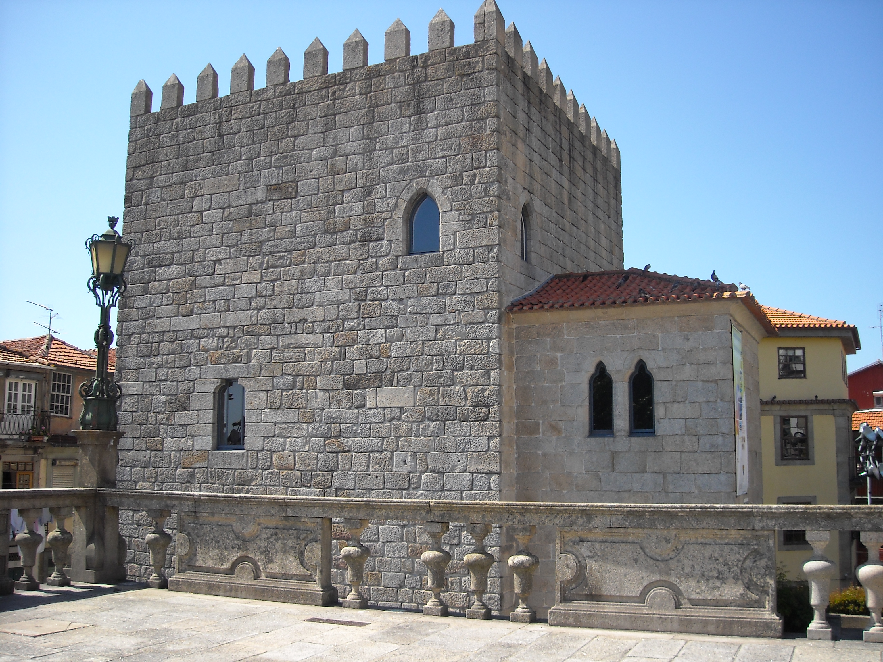 Torre Medieval da cidade do Porto, vistas a partir da Sé do Porto; (Torre da Rua de D. Pedro Pitões)